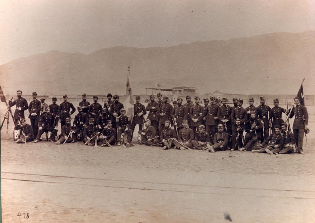 Rgto nº 4 de Linea en Antofagasta